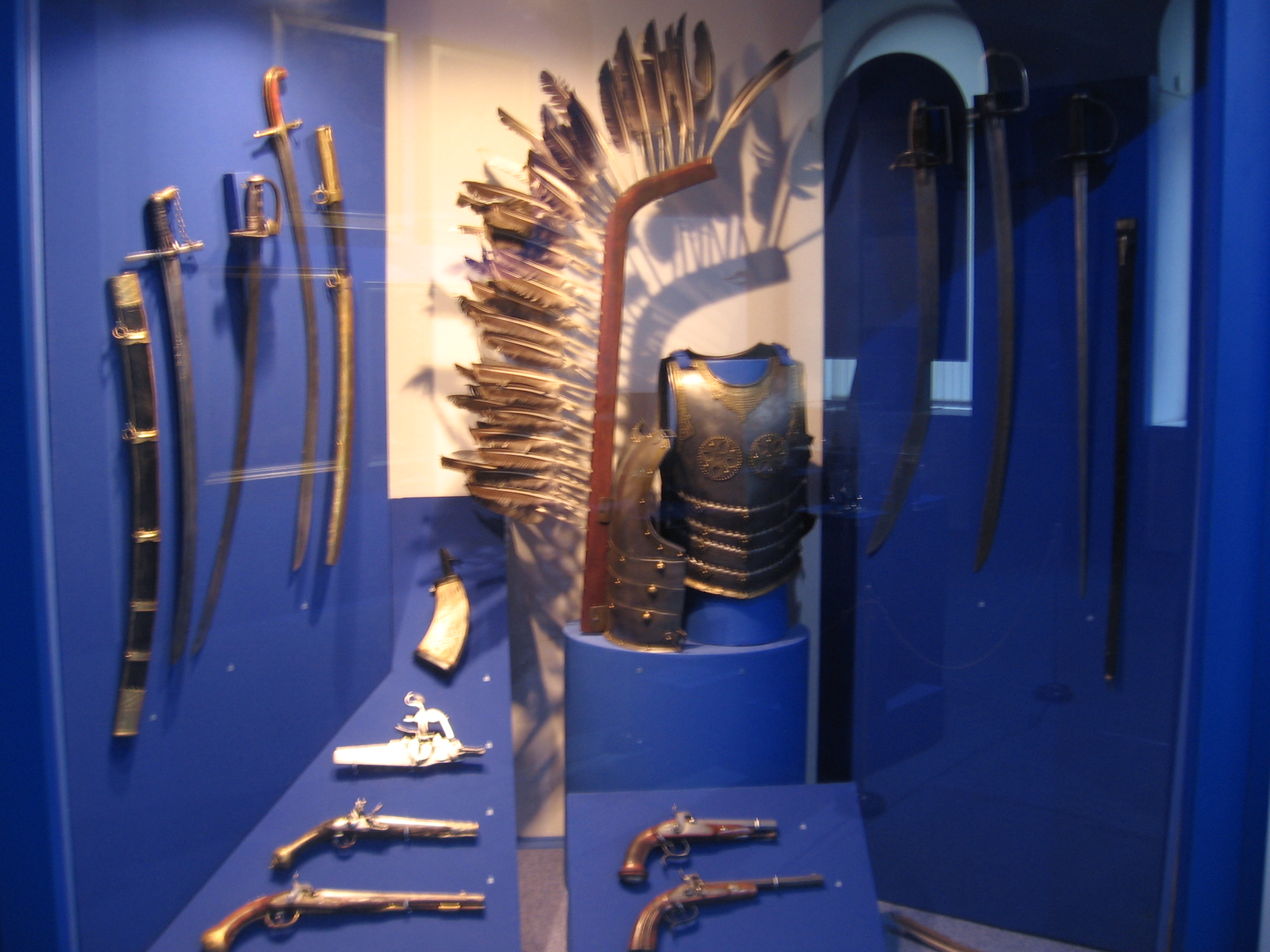 Обмундирование крылатых гусар Речи Посполитой. Находятся в Нац.ист. музее РБ